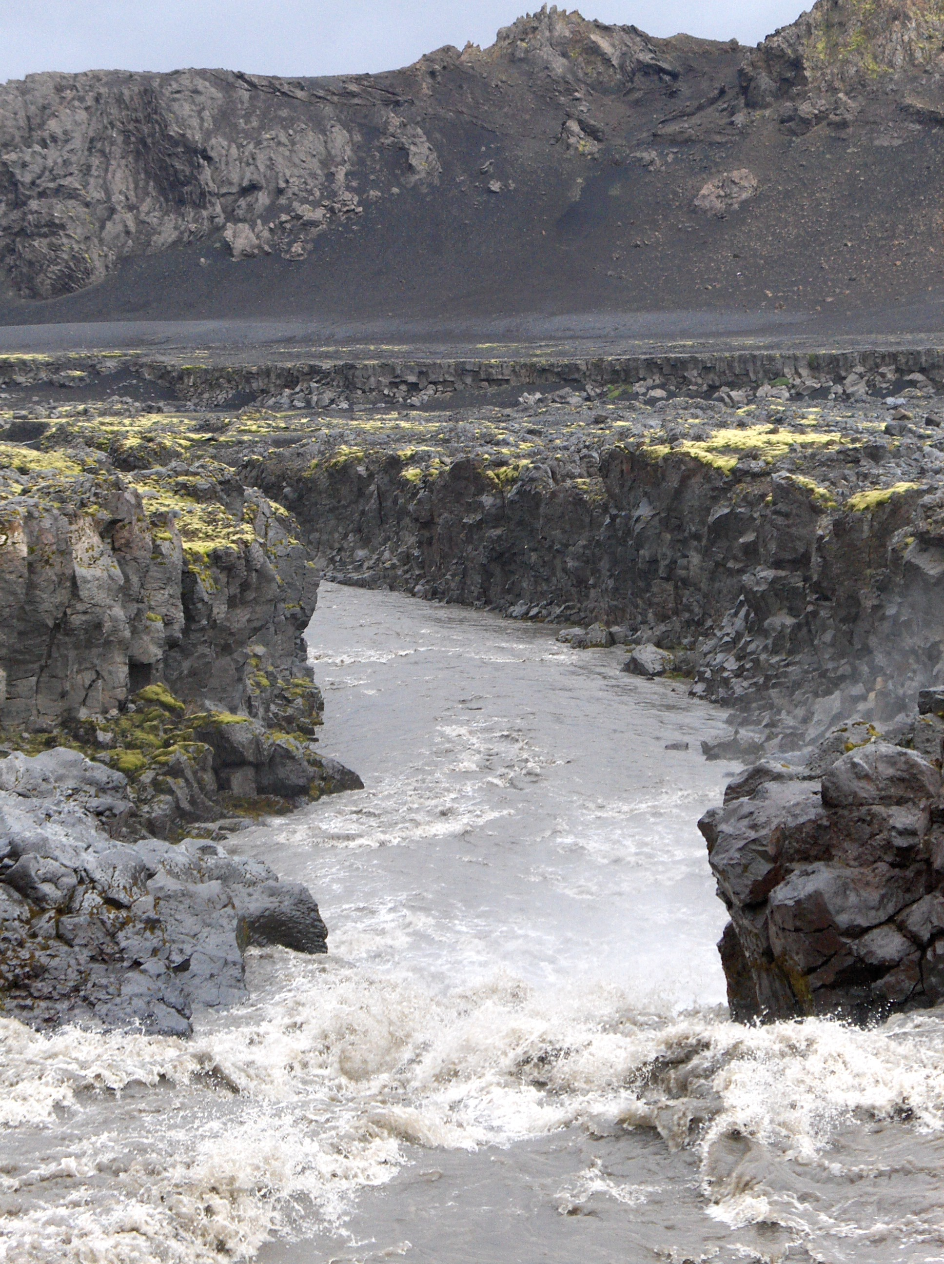 Innri-Emsrtuá